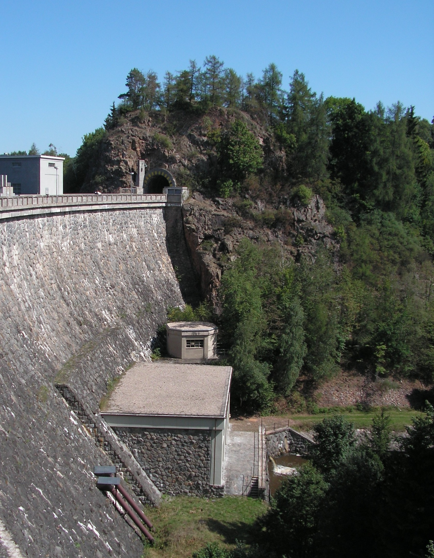 Vodní nádrž Seč-hráz